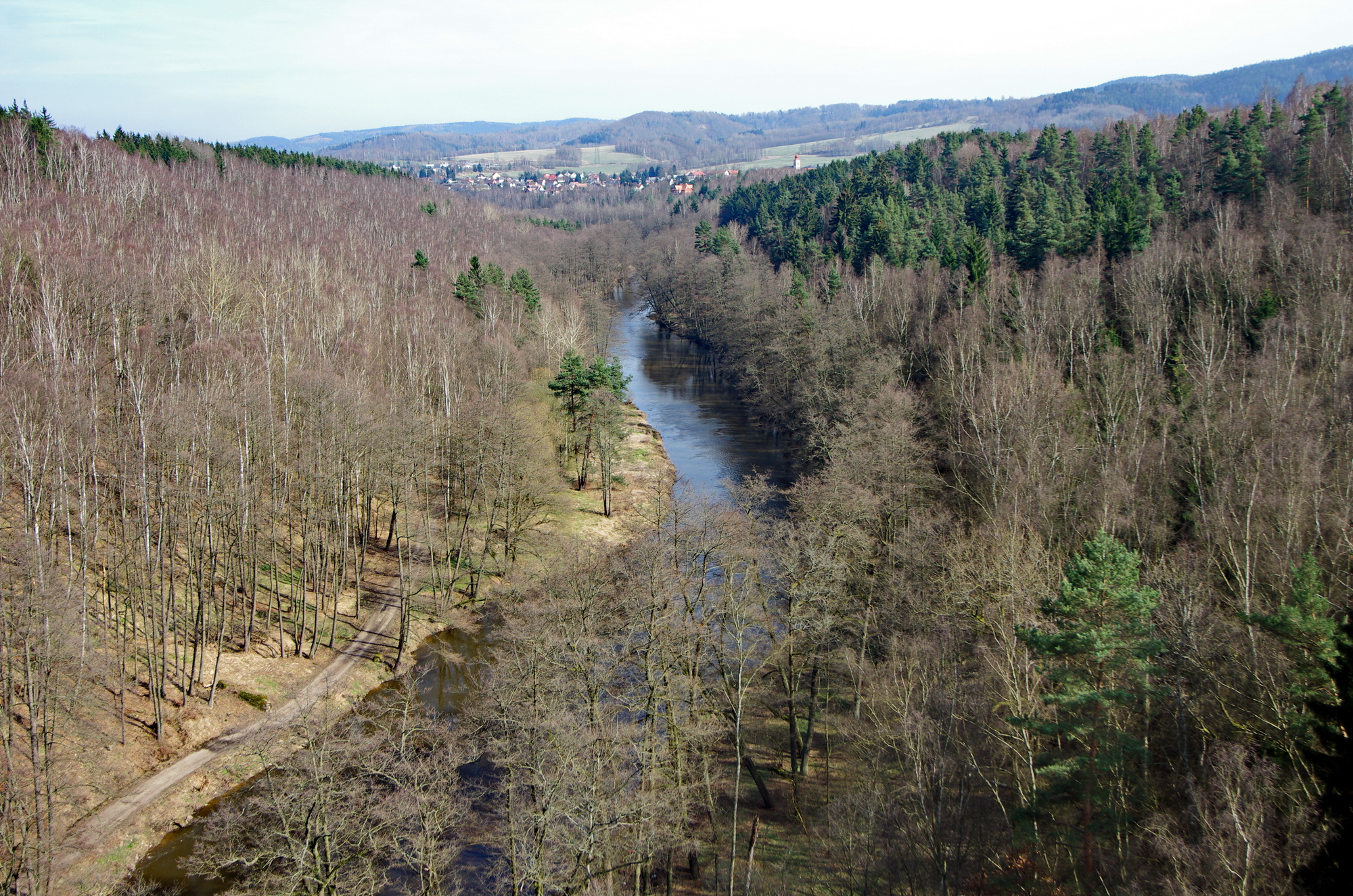 přírodní památka Údolí Ohře, okres Sokolov